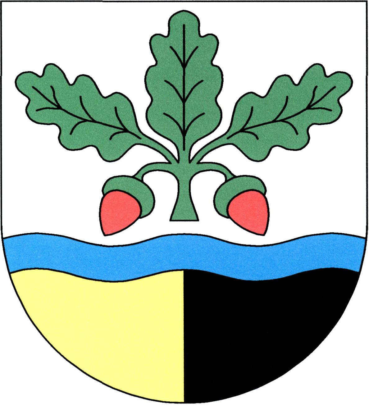 Znak obce Dubnice